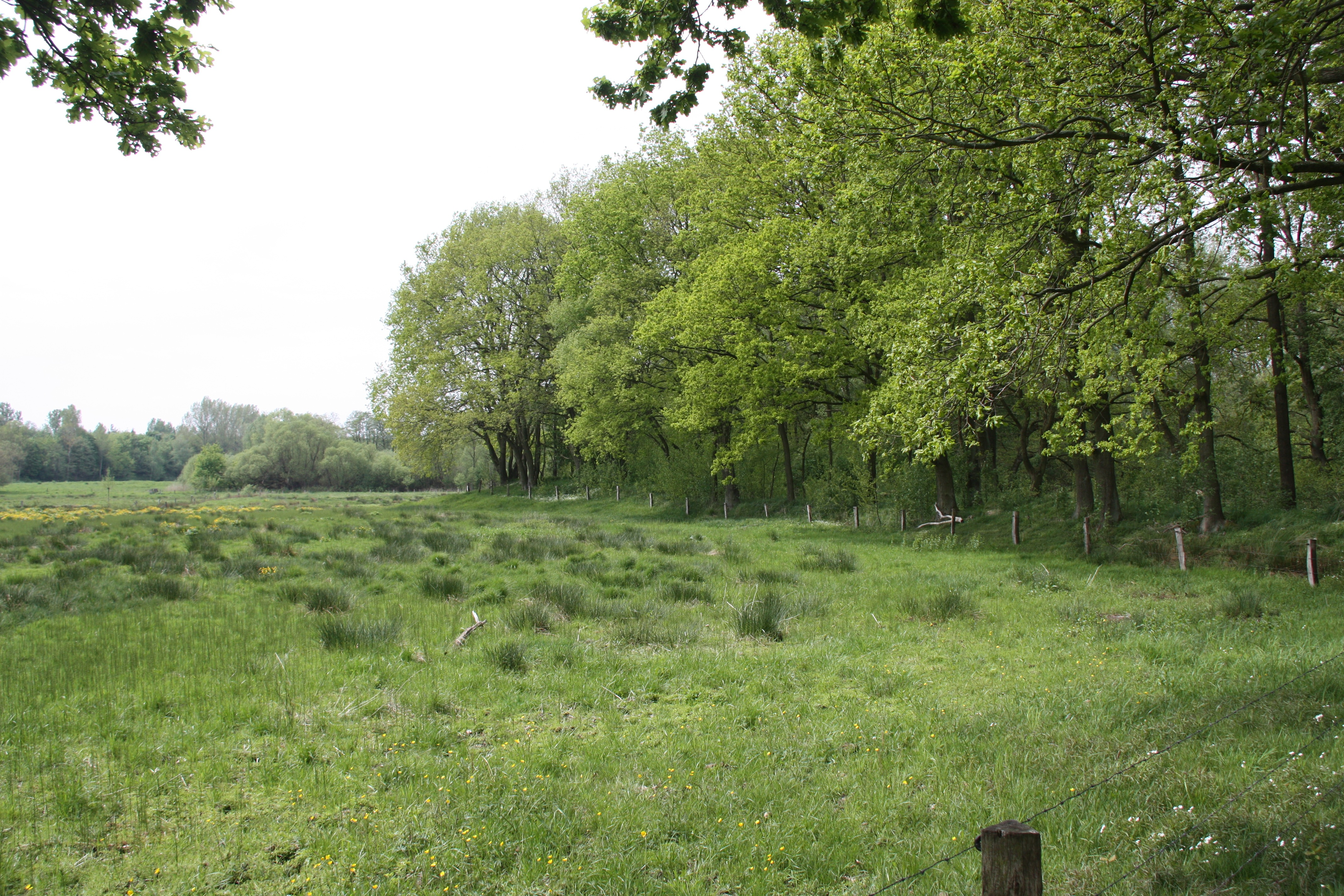 Hamburg, Rahlstedt, Stellmoorer Tunneltal, Waldrand